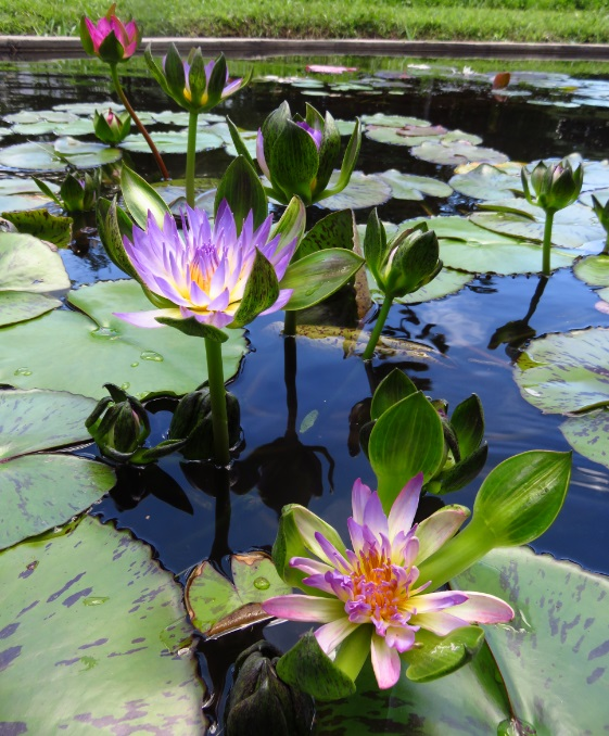 1.Flores en la Laguna Venezuela, Jardín Botanico de la UCV, Caracas, Venezuela